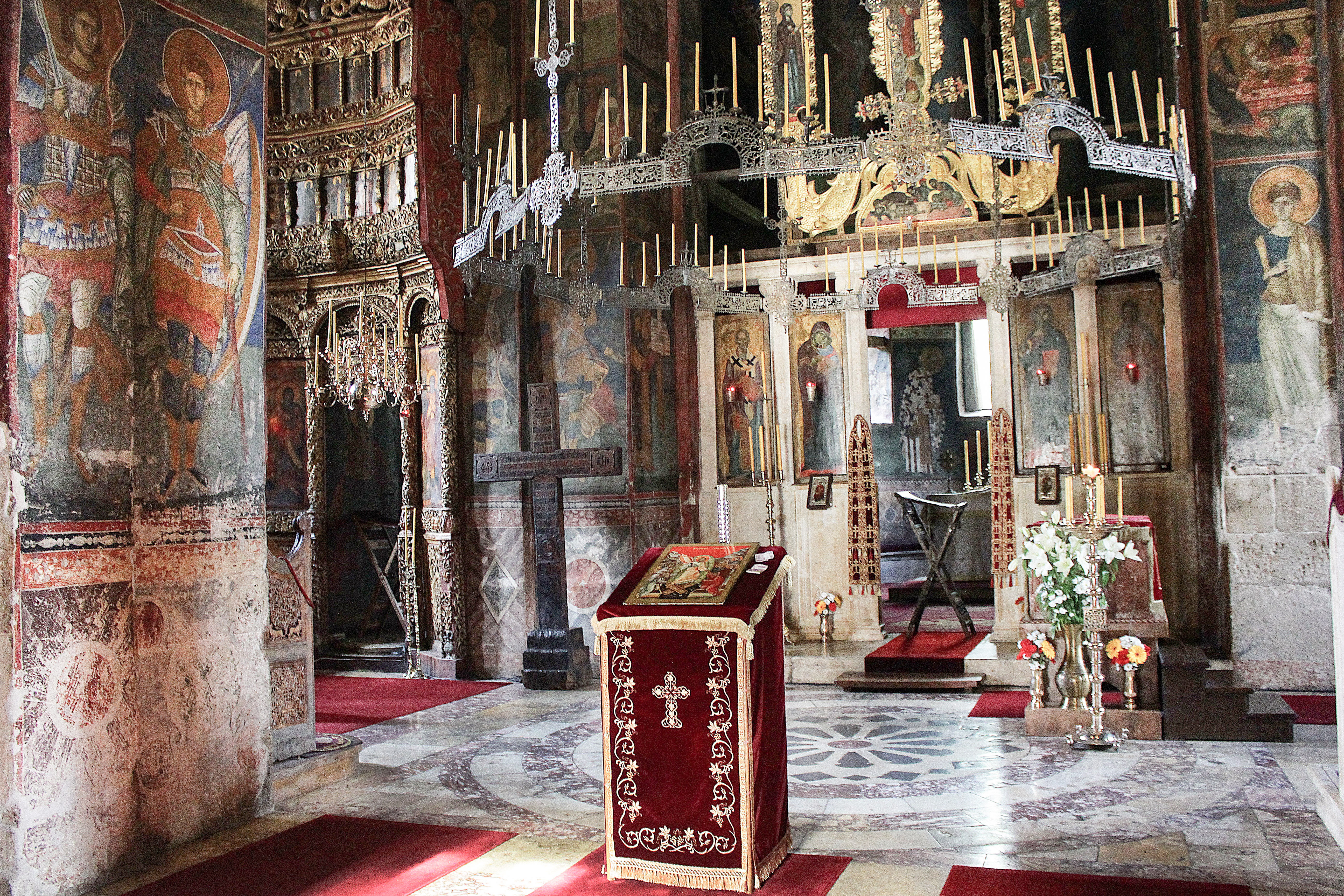 Manastiri i Deçanit